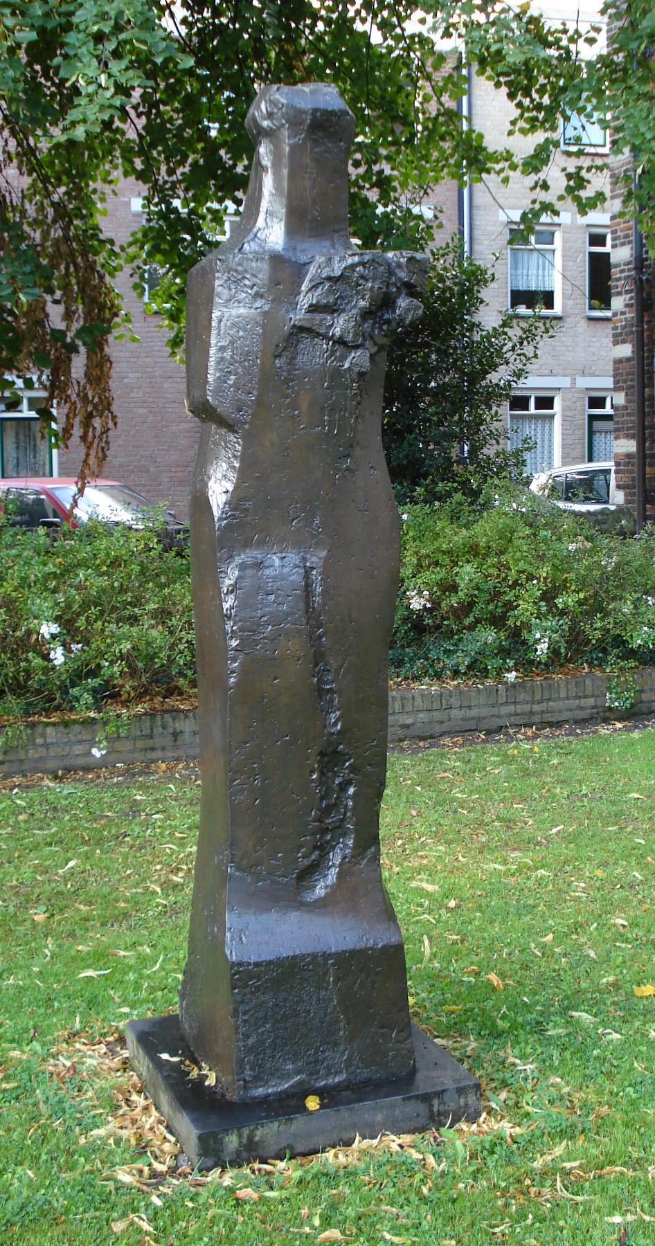 Schiedam, Oude Kerkhof. Kunstwerk "Sint Liduina" van Judith Pfaeltzer. Schiedam/The Netherlands.